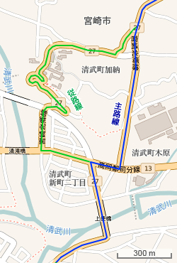 宮崎県道27号宮崎北郷線 複数経路図 （OpenStreetMapの画像を一部修正） This map may be incomplete, and may contain errors. Don't rely solely on it for navigation.